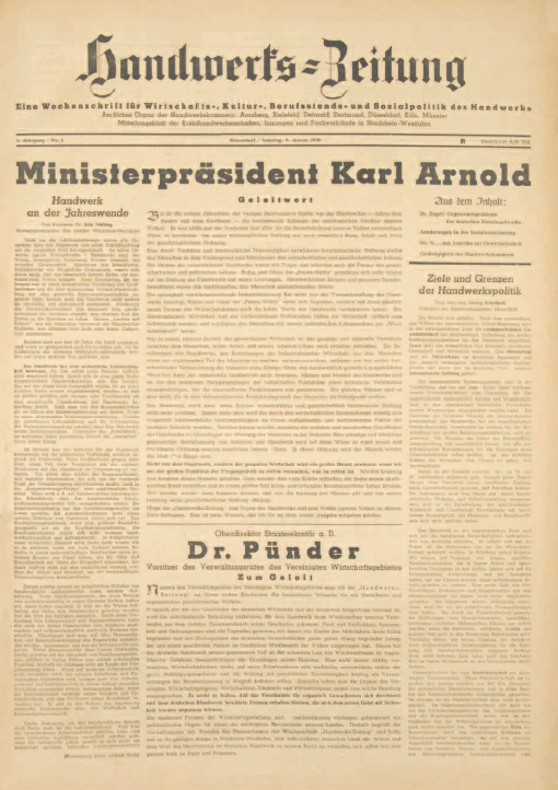 Handwerks-Zeitung 1. Ausgabe Titelseite, 1949